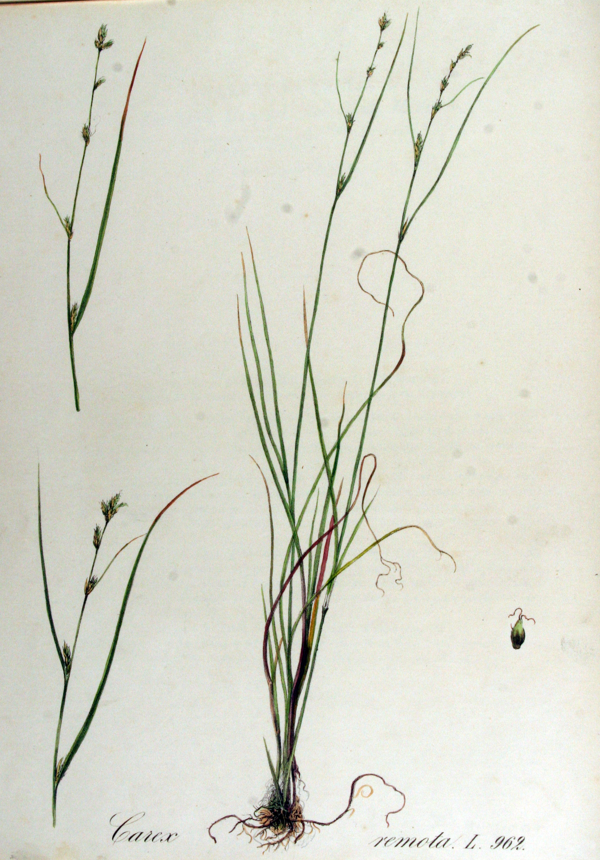 Carex remota Jusl. ex L.